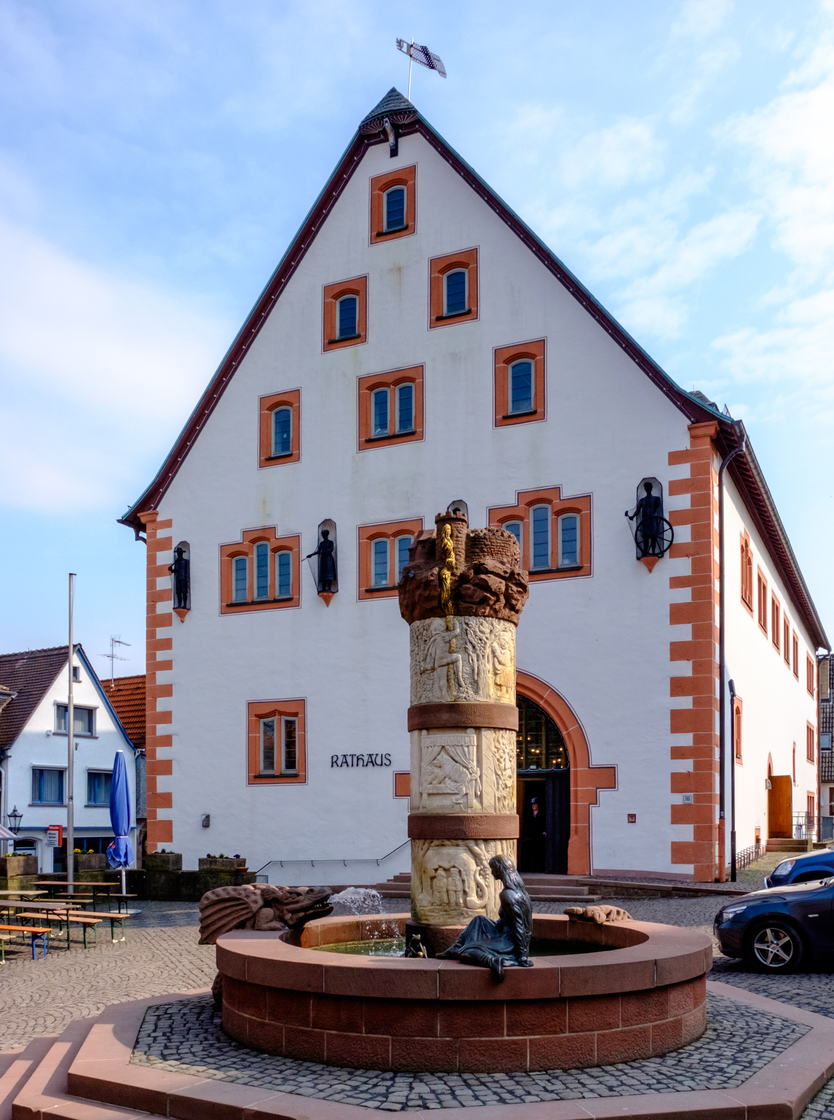 Märchenbrunnen, errichtet 1985 von dem Künstler Wolfgang Finger-Rokitnitz, vor dem Rathaus in Steinau an der Straße